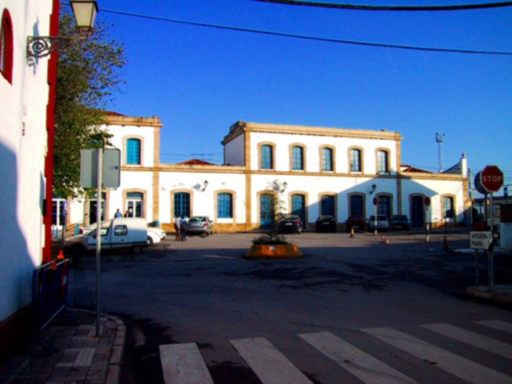 Bahnhof von Bobadilla